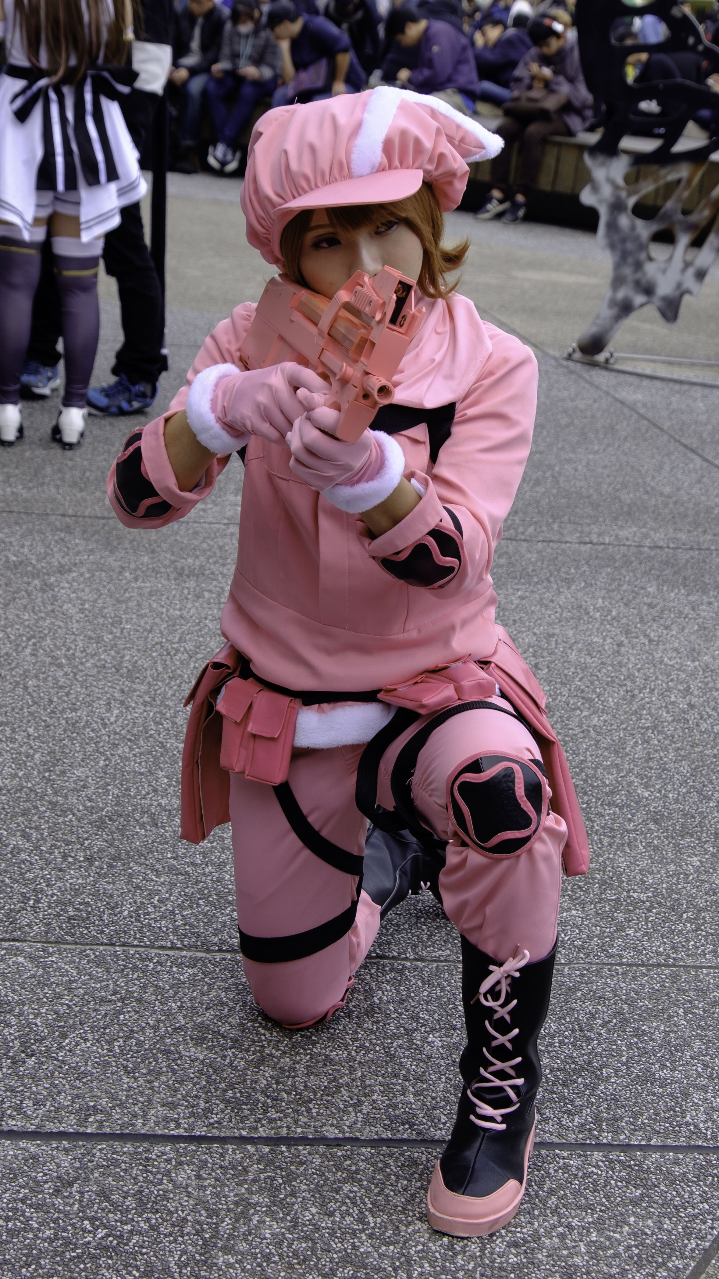 巴哈姆特電玩資訊站22週年站聚，《刀劍神域外傳Gun Gale Online》蓮cosplayer。